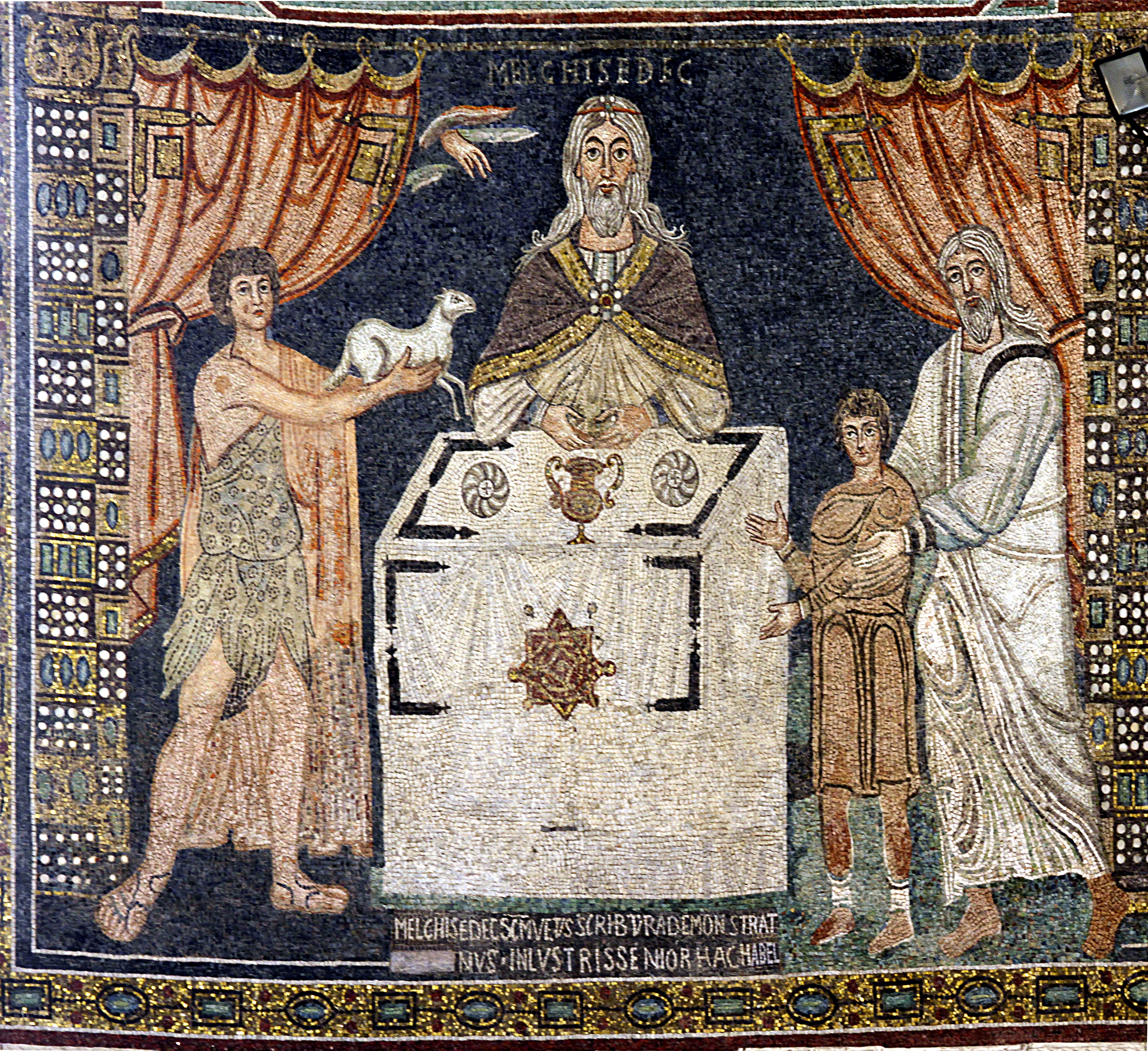 Sant'Apollinare in Classe - Ravenna